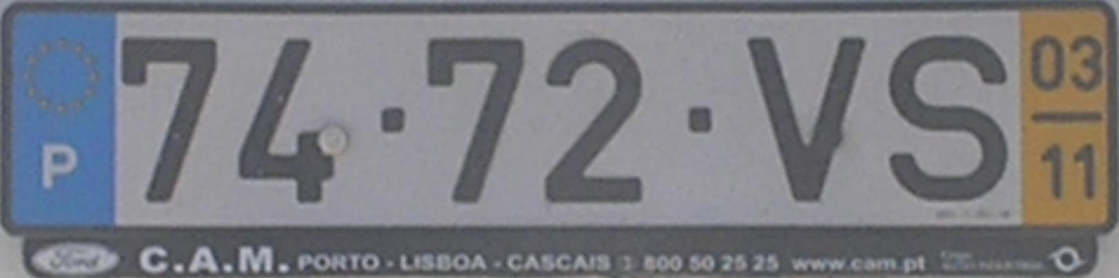 зображення номерного знаку